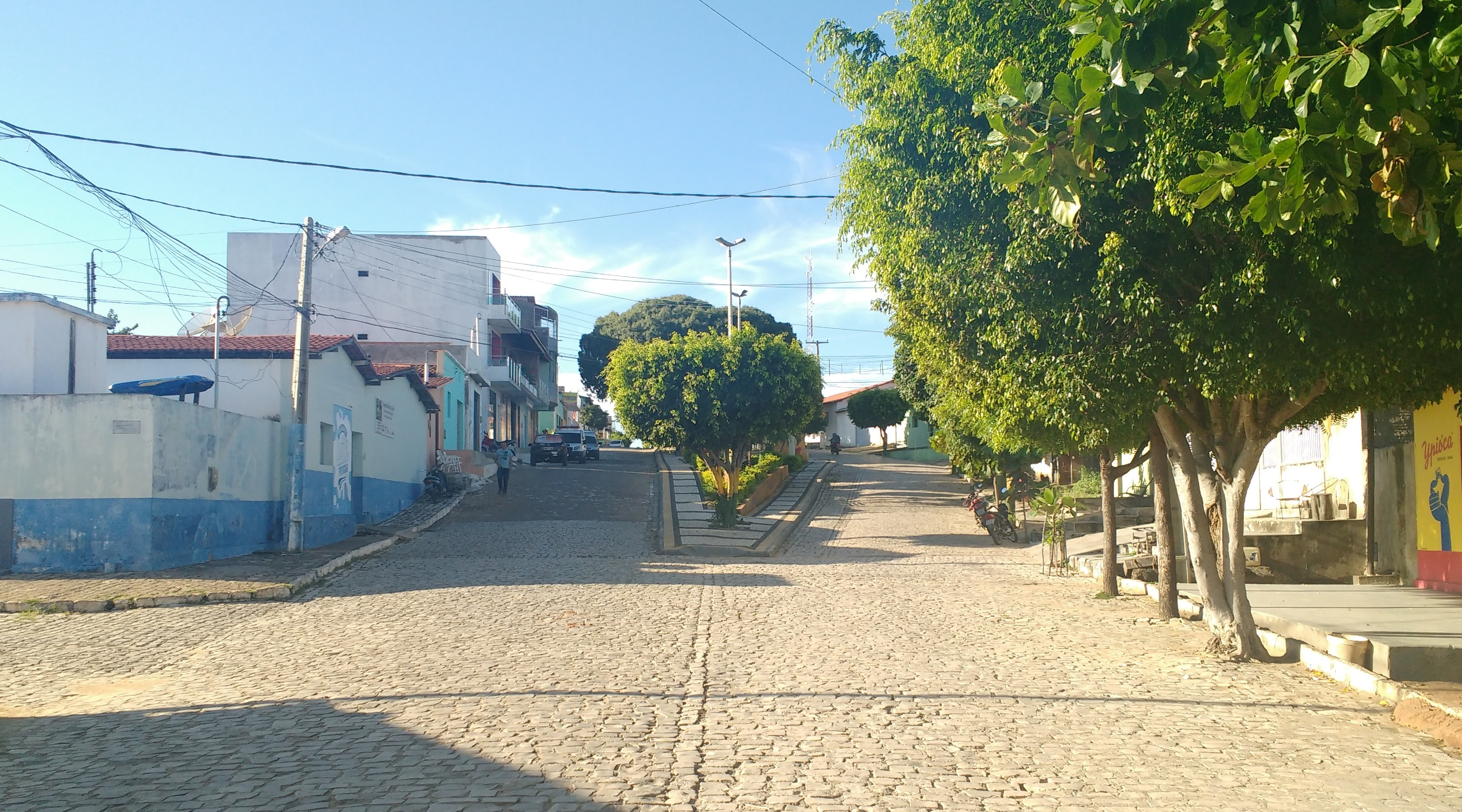 Rua Eugênio Costa em Serrinha dos Pintos, Rio Grande do Norte (Brasil), com destaque para a praça Genilson Araújo da Silva.